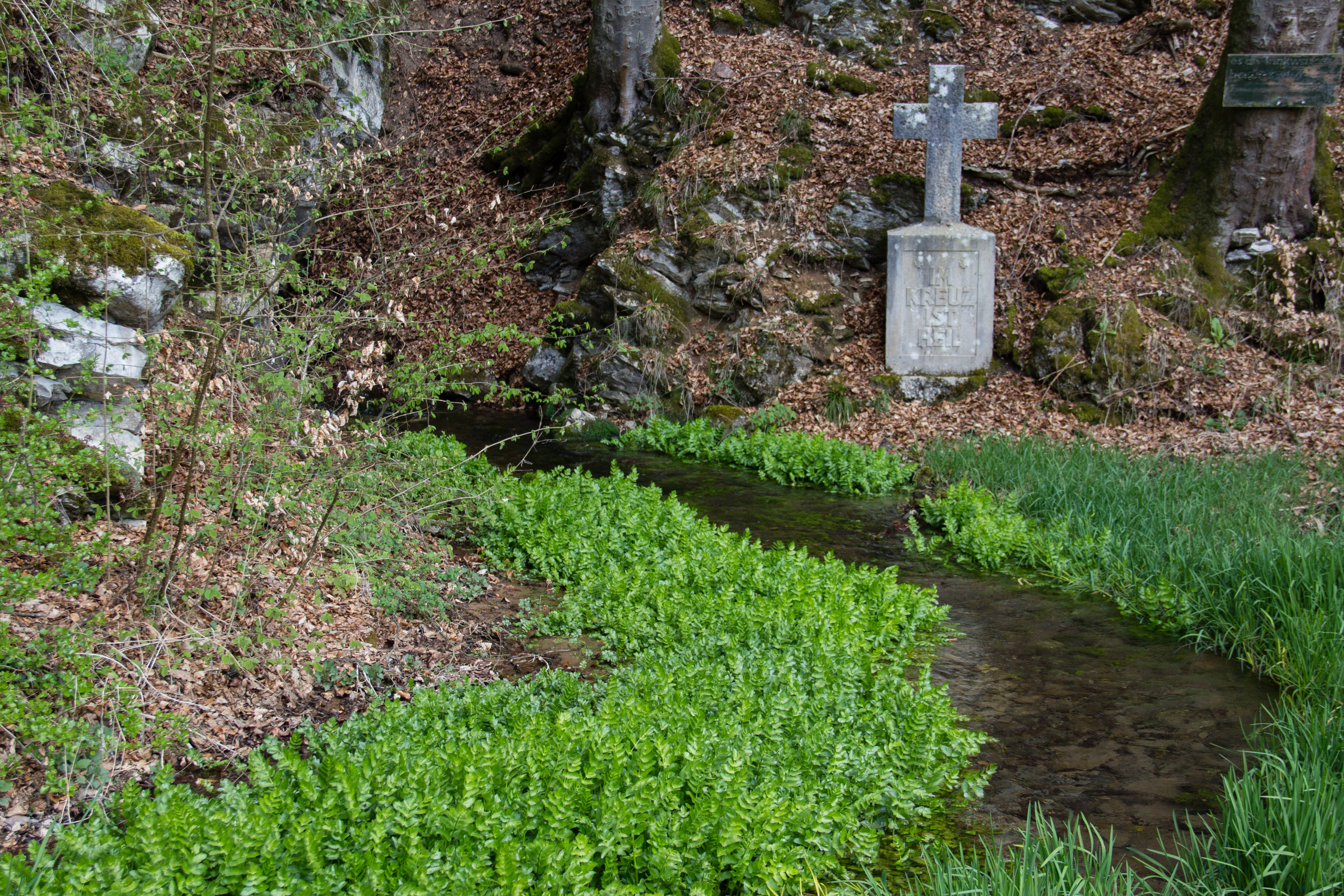 Weiße Laber, Dietfurt, Naturpark Altmühltal